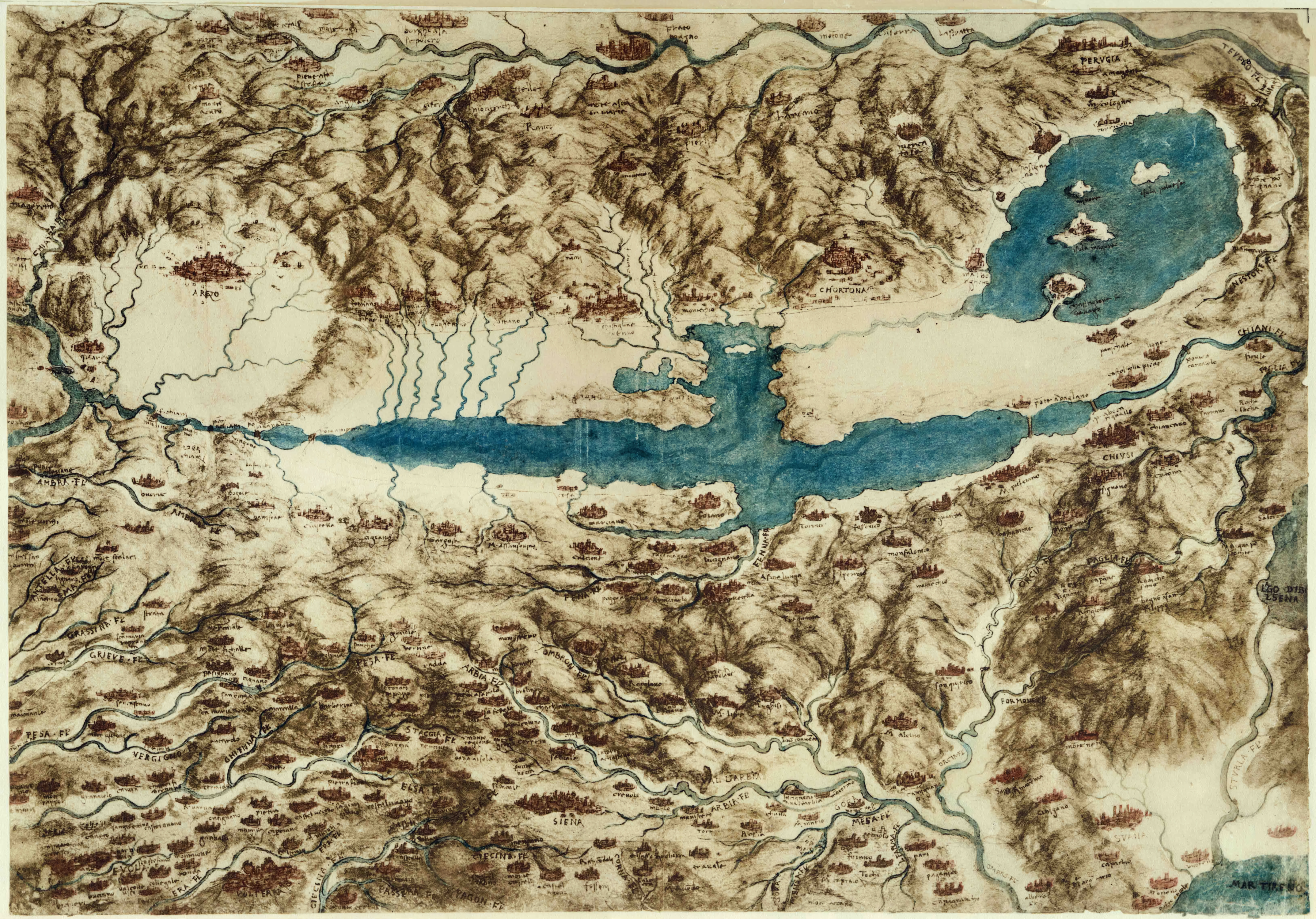 Val di Chiana Royal Collection